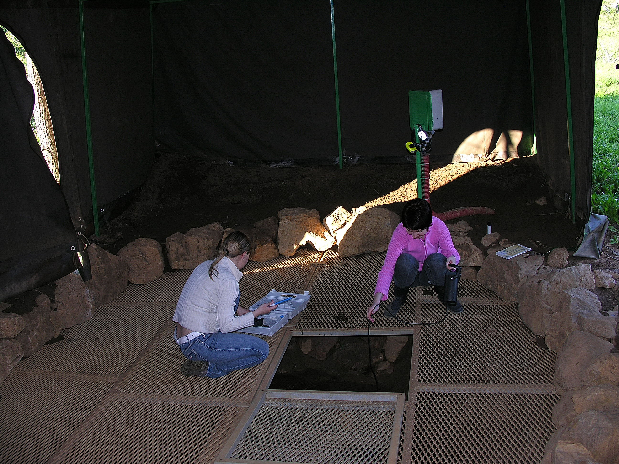 Raziskovalni bruhalnik v Jelševniku, kjer se proučuje kvakliteta vode, sedimentov in snema črnega močerila.